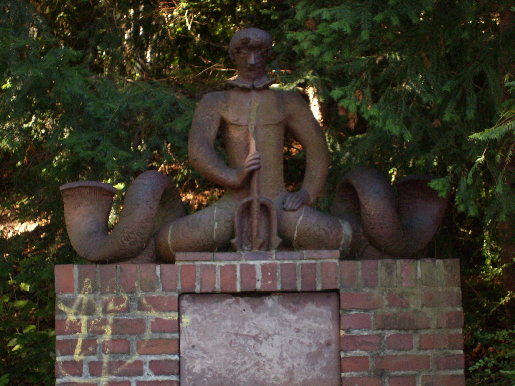 Neptun-Werbemal am Eingang zur Freilichtbühne in den Lübecker Wallanlagen von 1930